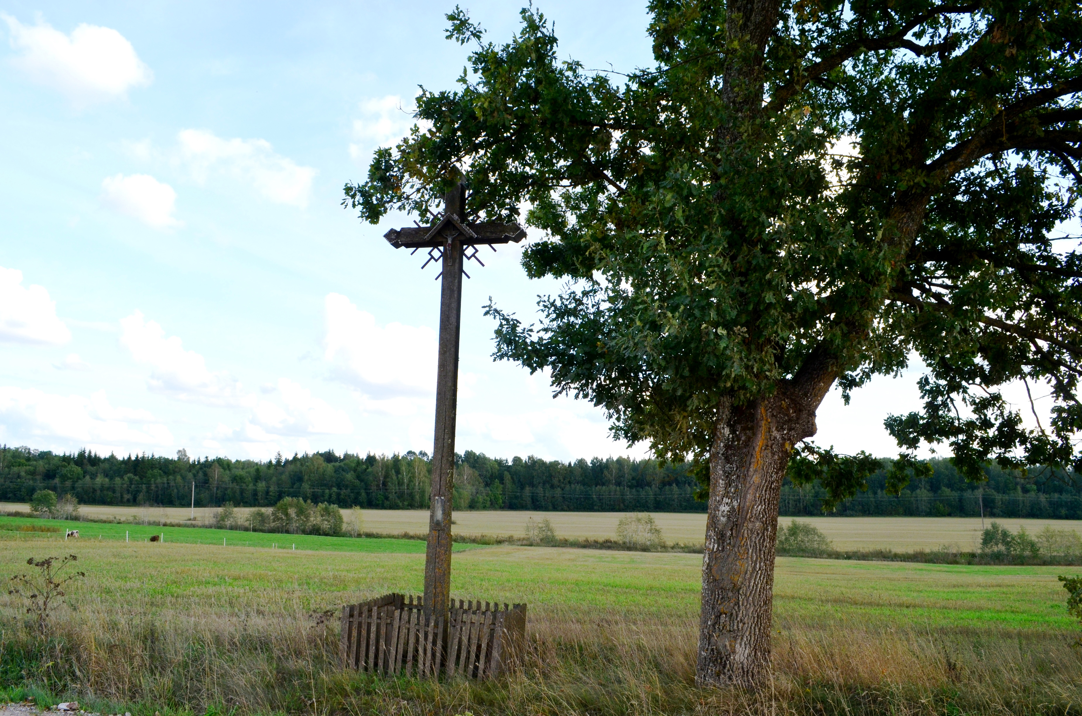 Legečiai, Radviliškio raj.